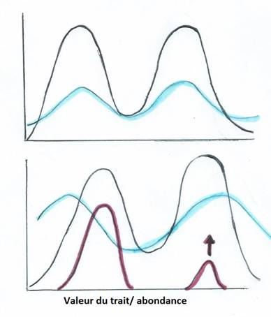 Type 1: pas de diversité Type 2: variation selon l'abondance de la ressource